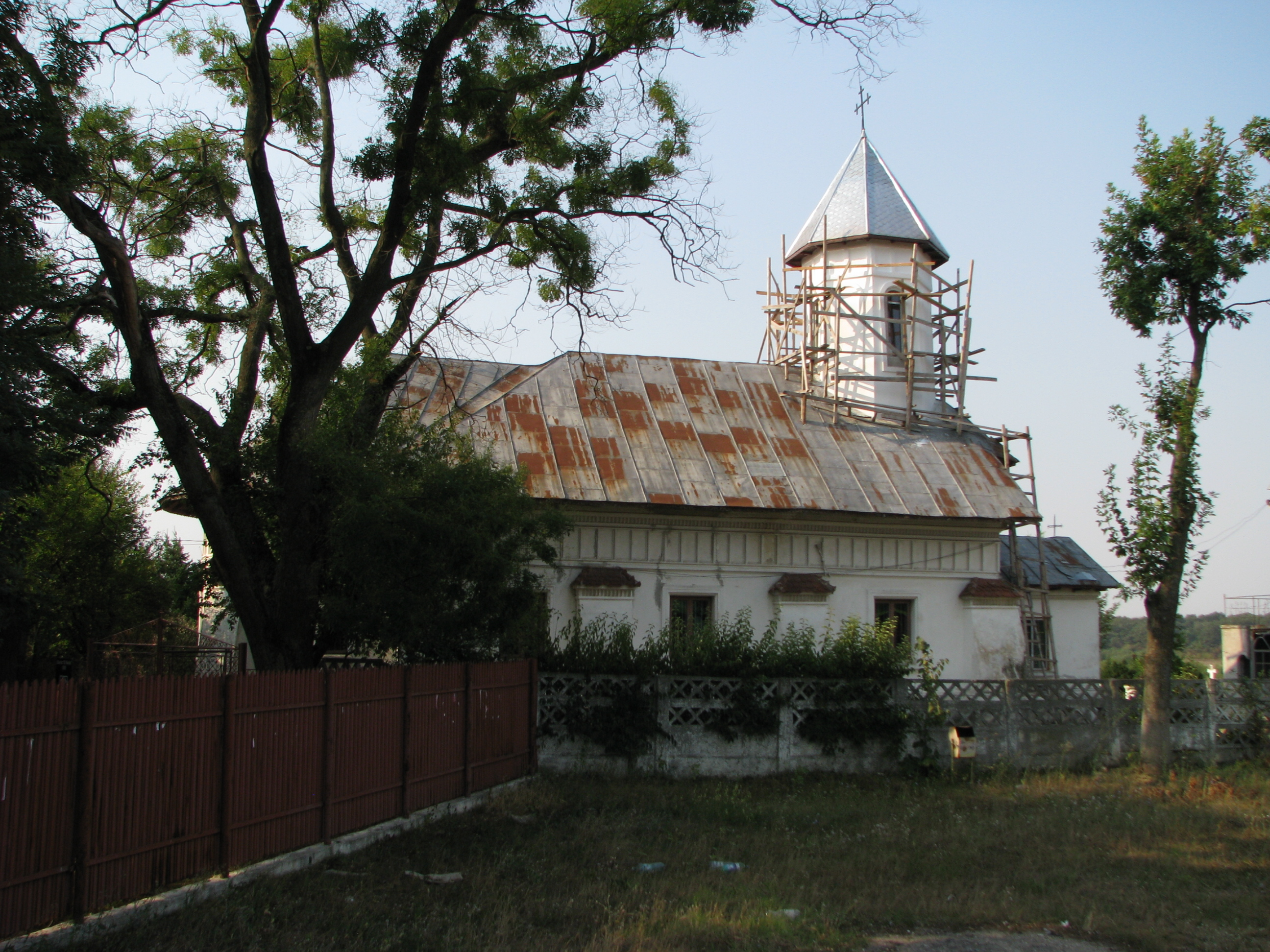 Biserica "Sf. Nicolae" din Bucșani